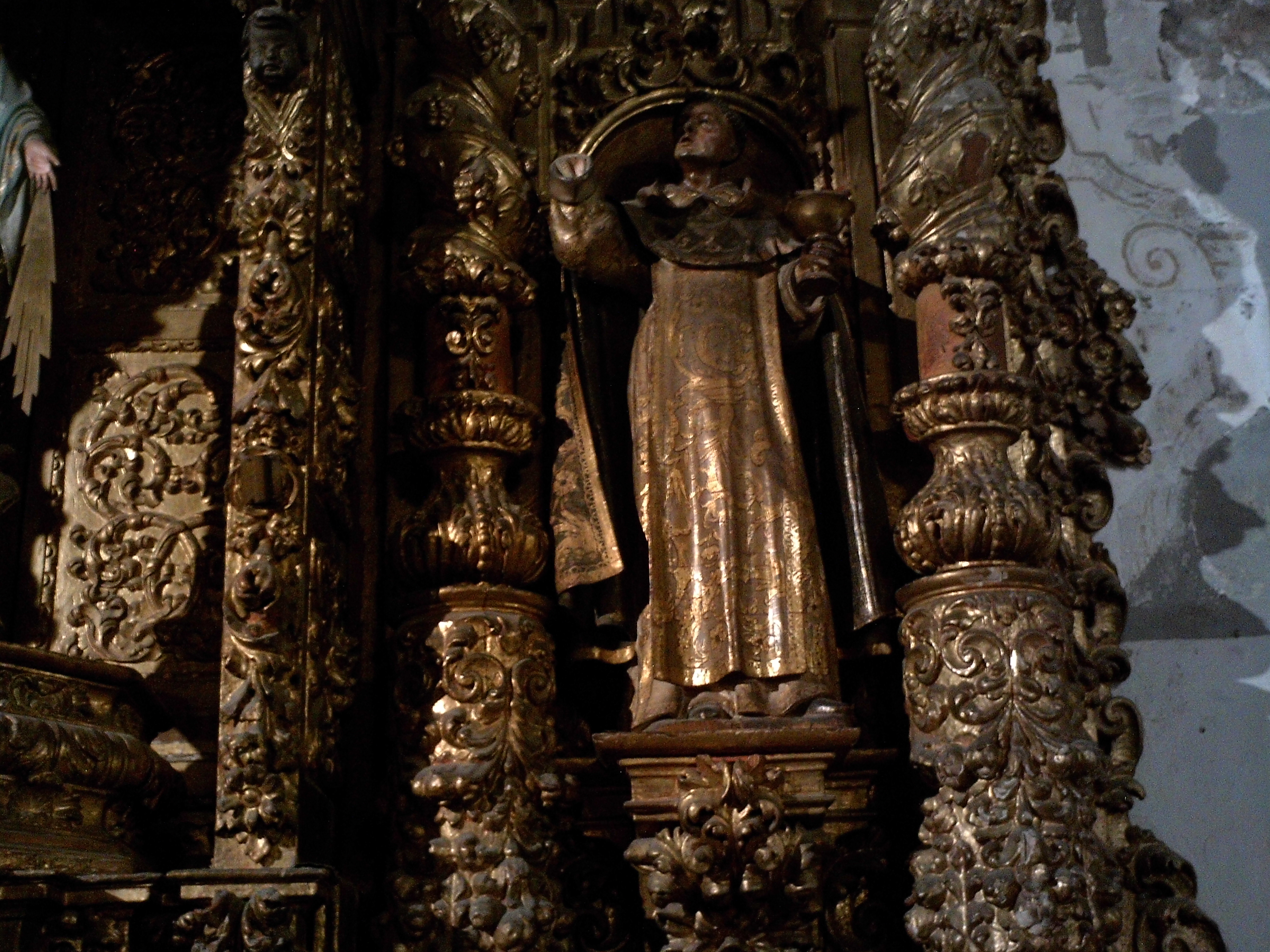 San Vicente Ferrer. Iglesia de la Magdalena. Sevilla, Andalucía, España.